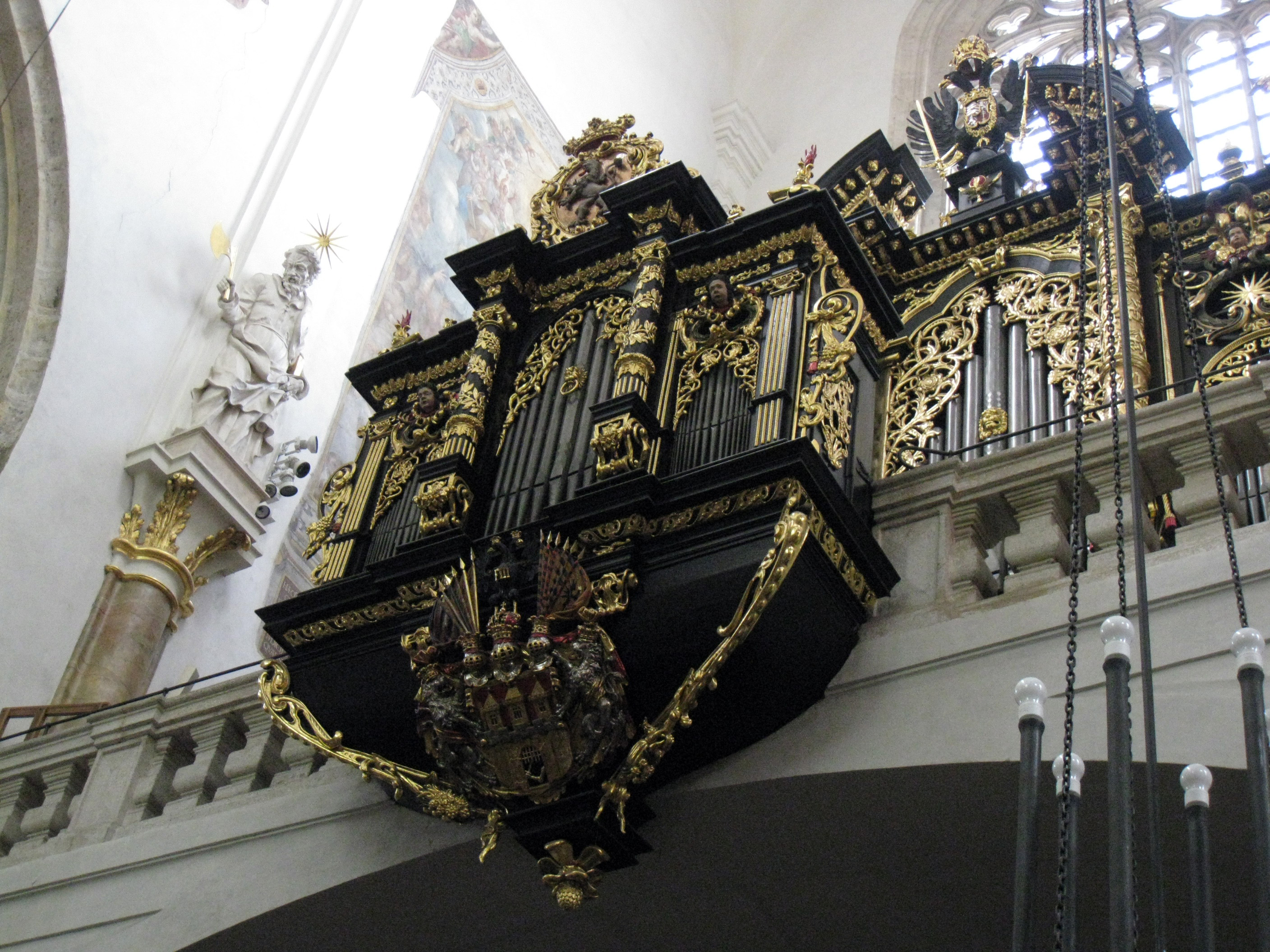 Praha 1-Staré Město, Týnský chrám, varhany.